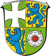 Wappen von Greifenstein (Hessen)